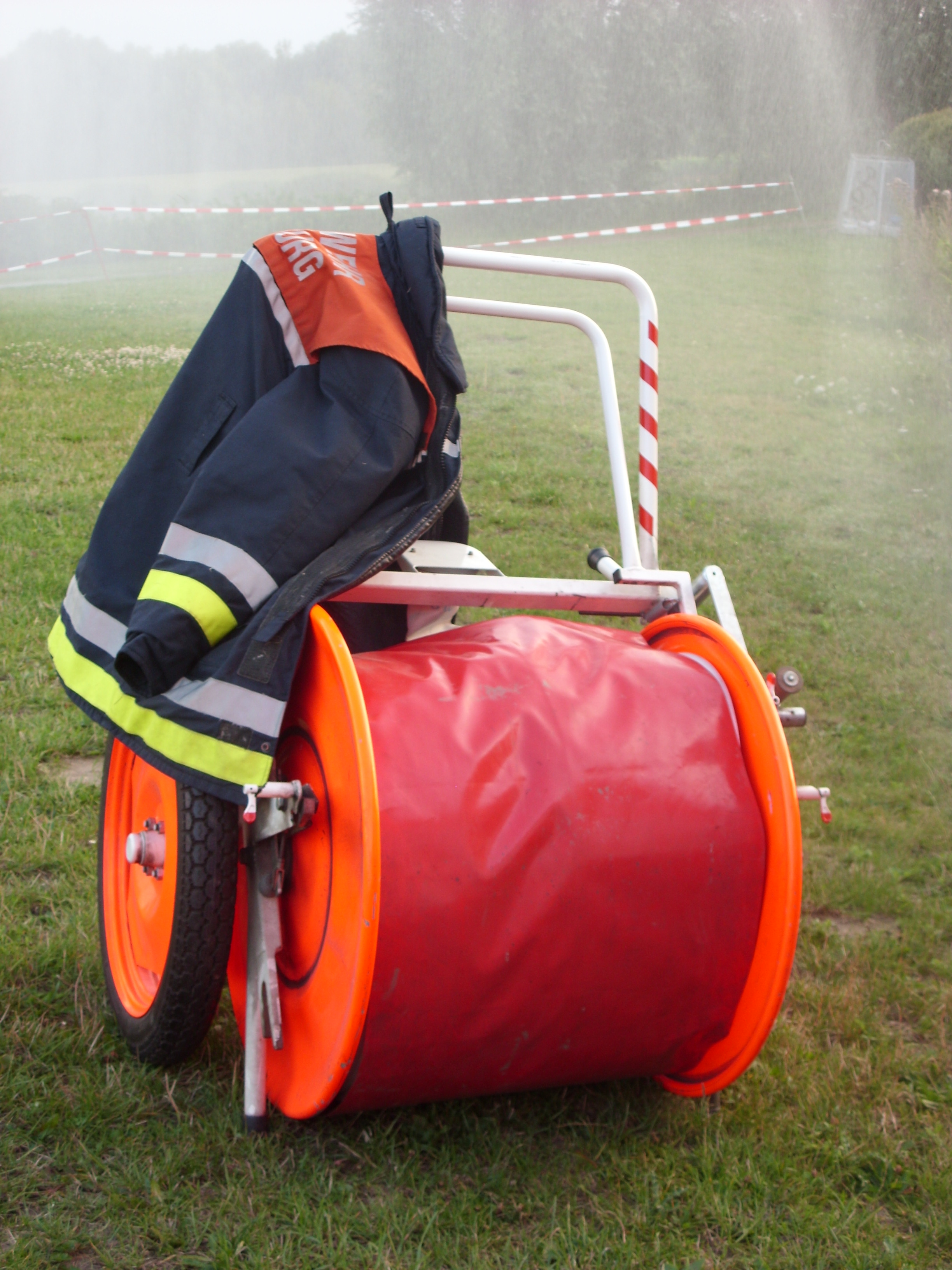 Die fahrbare Schlauchhaspel mit mehreren B-Schläuchen an einem Hilfeleistungslöschfahrzeug der Freiwilligen Feuerwehr Billwerder, Hamburg